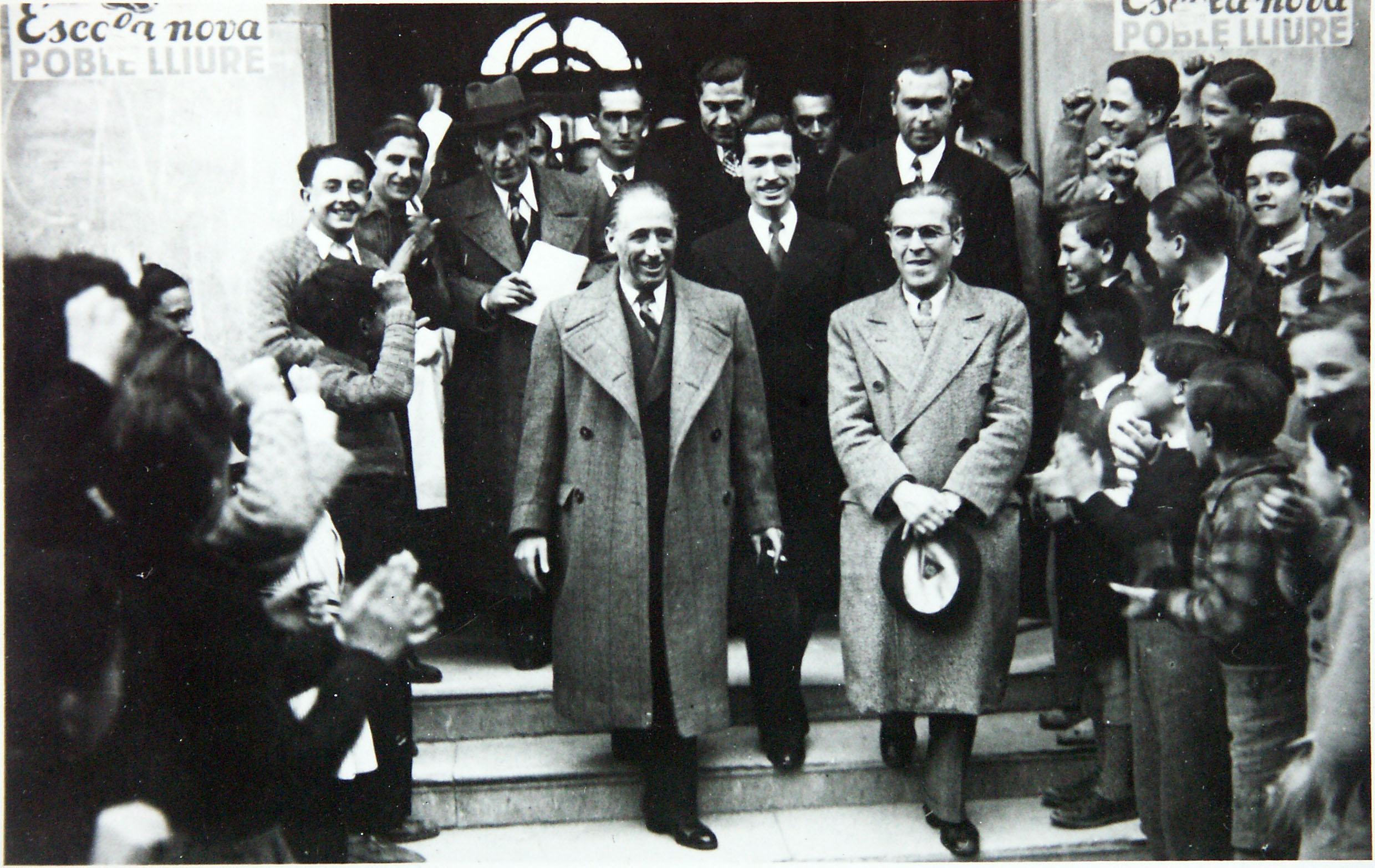 Visita del president de la Generalitat de Catalunya Lluís Companys a l'Institut Escola M. B. Cossío, acompanyat de Lluís Casals i Garcia (a la seva esquerra, amb bigoti), el regidor de Cultura de l'ajuntament de Sabadell Salvador Sarrà i Serravinyals, i l'alcalde de Sabadlel, Josep Moix i Regàs, entre altres. Sabadell, 16 de març de 1937 (autor desconegut / AHS).